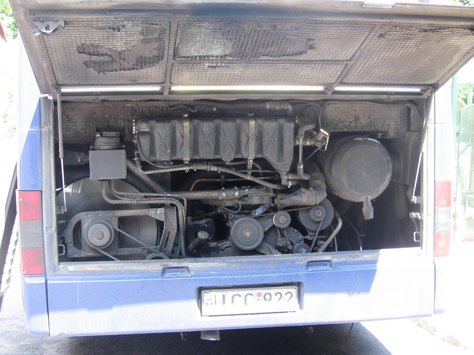 Egy MAN A74 SL223 típusú (szóló) busz motorja (Ómassa, Miskolc)